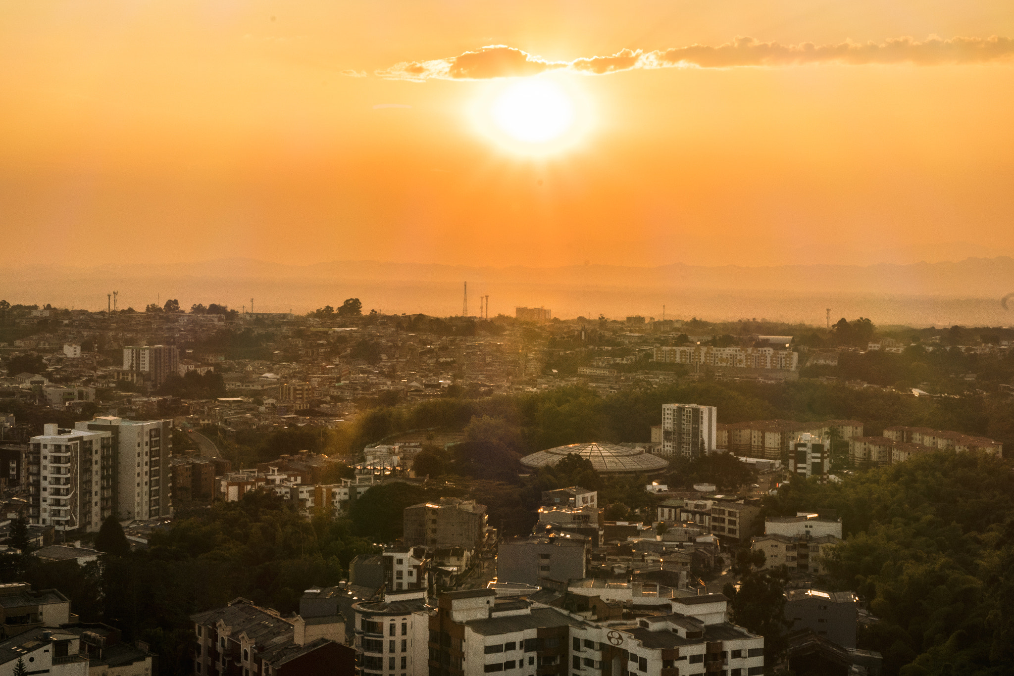 500px provided description: Atardecer desde la terraza del hotel Allure Mocawa [#sky ,#city ,#sunset ,#sun ,#clouds ,#girls ,#summer ,#fall ,#friends ,#happy ,#music ,#party ,#fiesta ,#sunglasses ,#gente ,#sol ,#atardecer ,#gafas ,#armenia ,#tarde ,#rooftop ,#djs ,#terraza ,#quindio ,#lentes de sol]